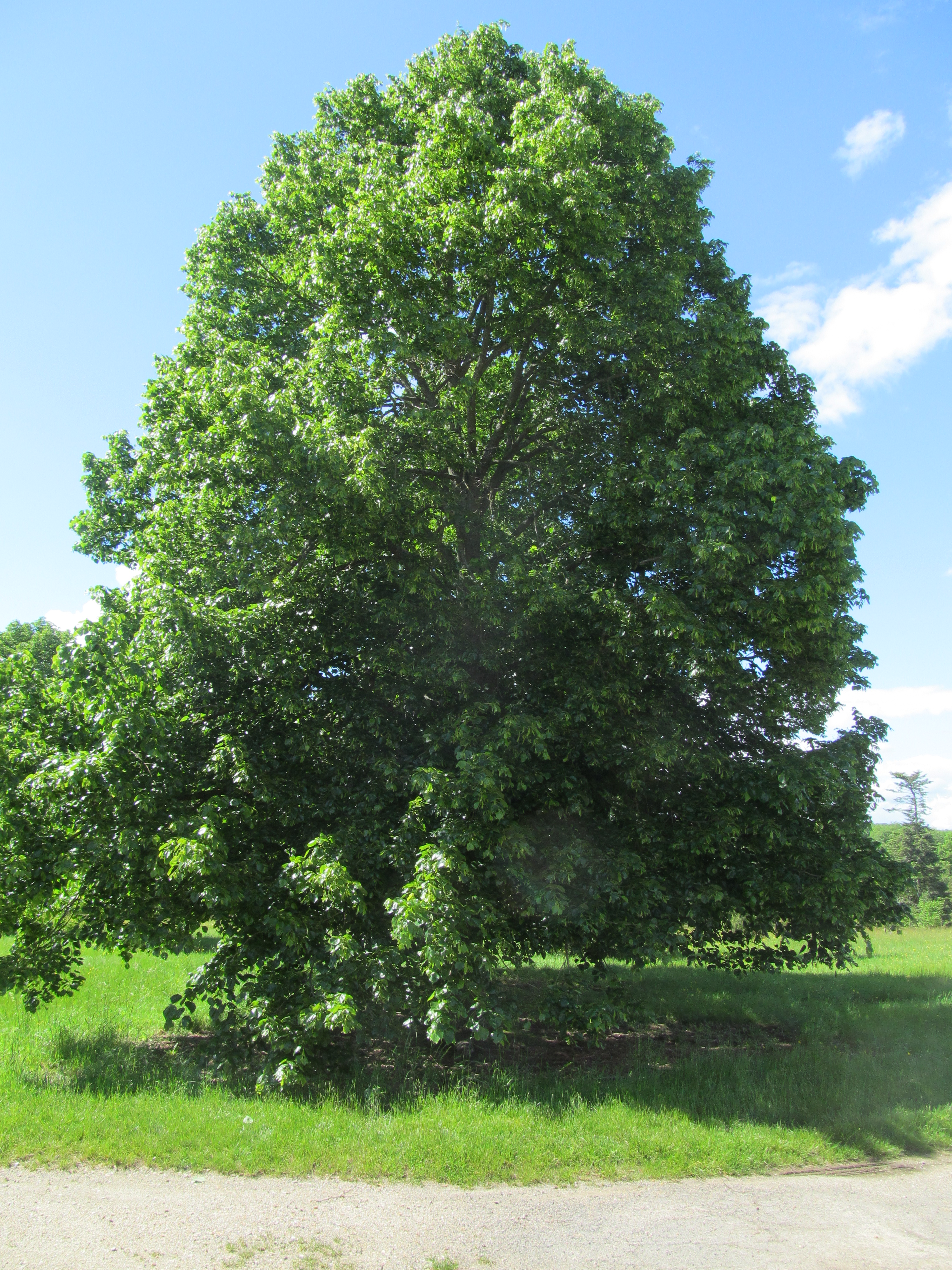 Variété de tilleul (tilia dasystyla), individu agé de 40 ans, Arboretum de Chèvreloup, France